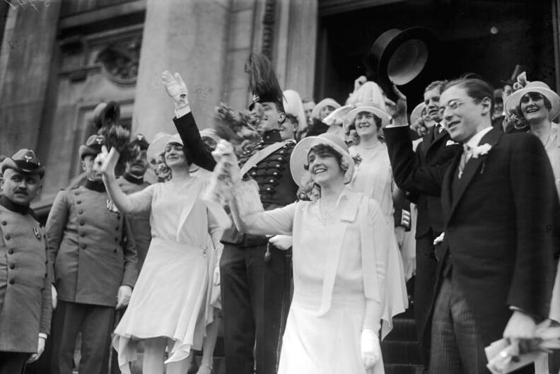 Die feierliche Trauung des Fürsten Otto von Bismarck, dem Enkel des Altreichskanzlers, mit Frl. Tengboom aus Schweden, im Berliner Dom! Anwesend waren der Herr Reichspräsident, sowie Mitglieder der Reichsregierung und der schwedischen Botschaft in Berlin! Hochzeitsgäste winken von der Freitreppe des Berliner Domes dem abfahrenden Brautpaar zu.